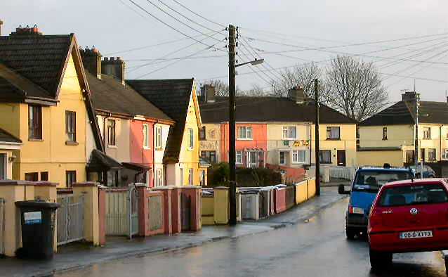 Tithiocht poibli blianta na 1930i agus na 1940i, Cill Inion Leinn, Luimneach